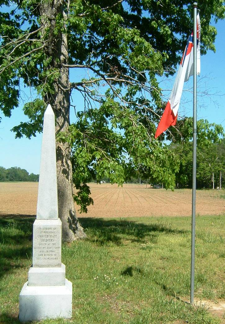 Slaget ved Hawes Shop. Blik mod øst over slagmarken fra Enon Church.